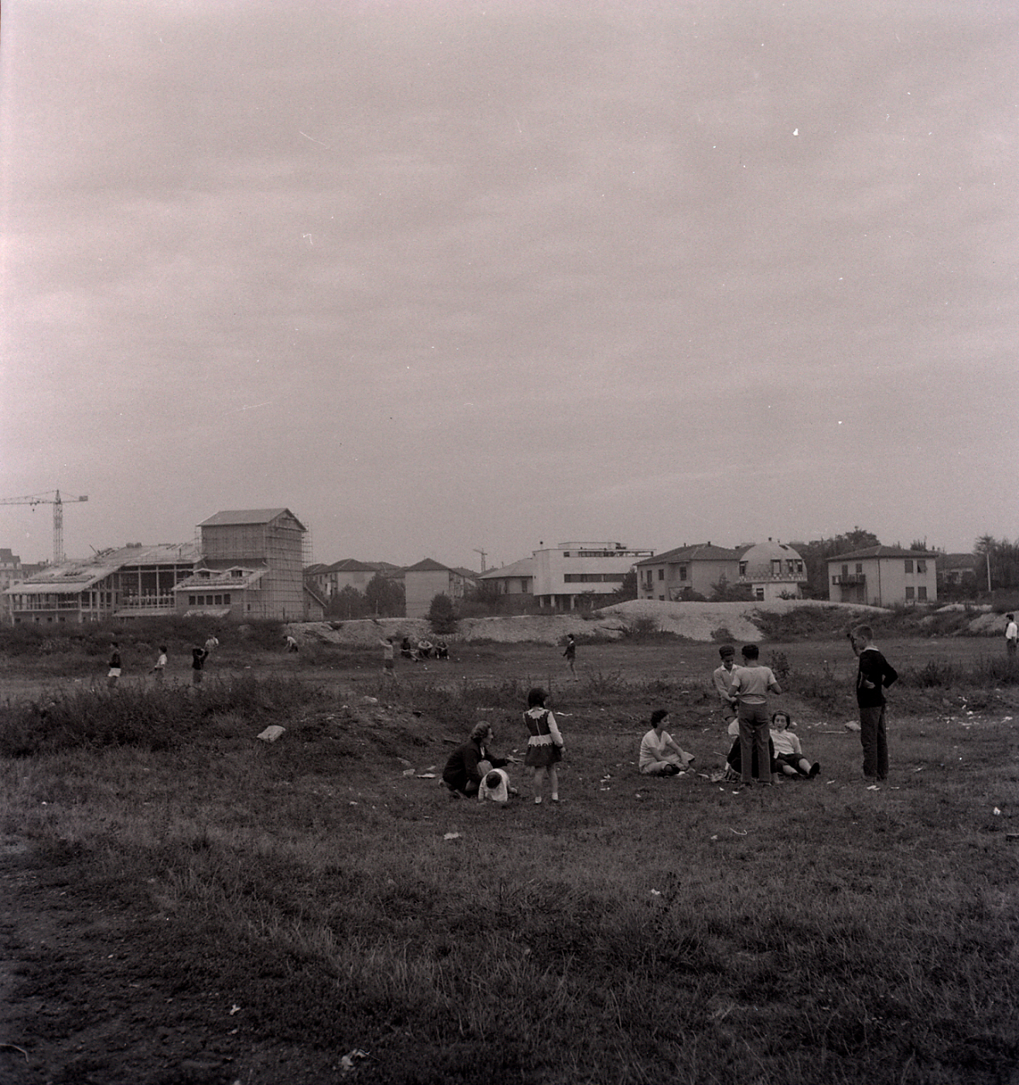 Serie fotografica : Milano, 1970 / Paolo Monti. - Buste: 5, Fototipi: 5 : Negativo b/n, gelatina bromuro d'argento/ pellicola ; 6x6. - ((Serie costituita da 5 negativi identificati con i nn.: 8443, 8445, 8449, 8460, 8463. La suddetta serie è contenuta nella scatola identificata con la numerazione R8371-8564. Sul coperchio della scatola manoscritto: "Milano Periferia". Sulla busta 8449 manoscritto: "Via M. Gioia". - Via Melchiorre Gioia